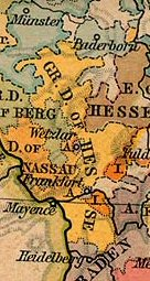 Oude kaart van Hessen 1806